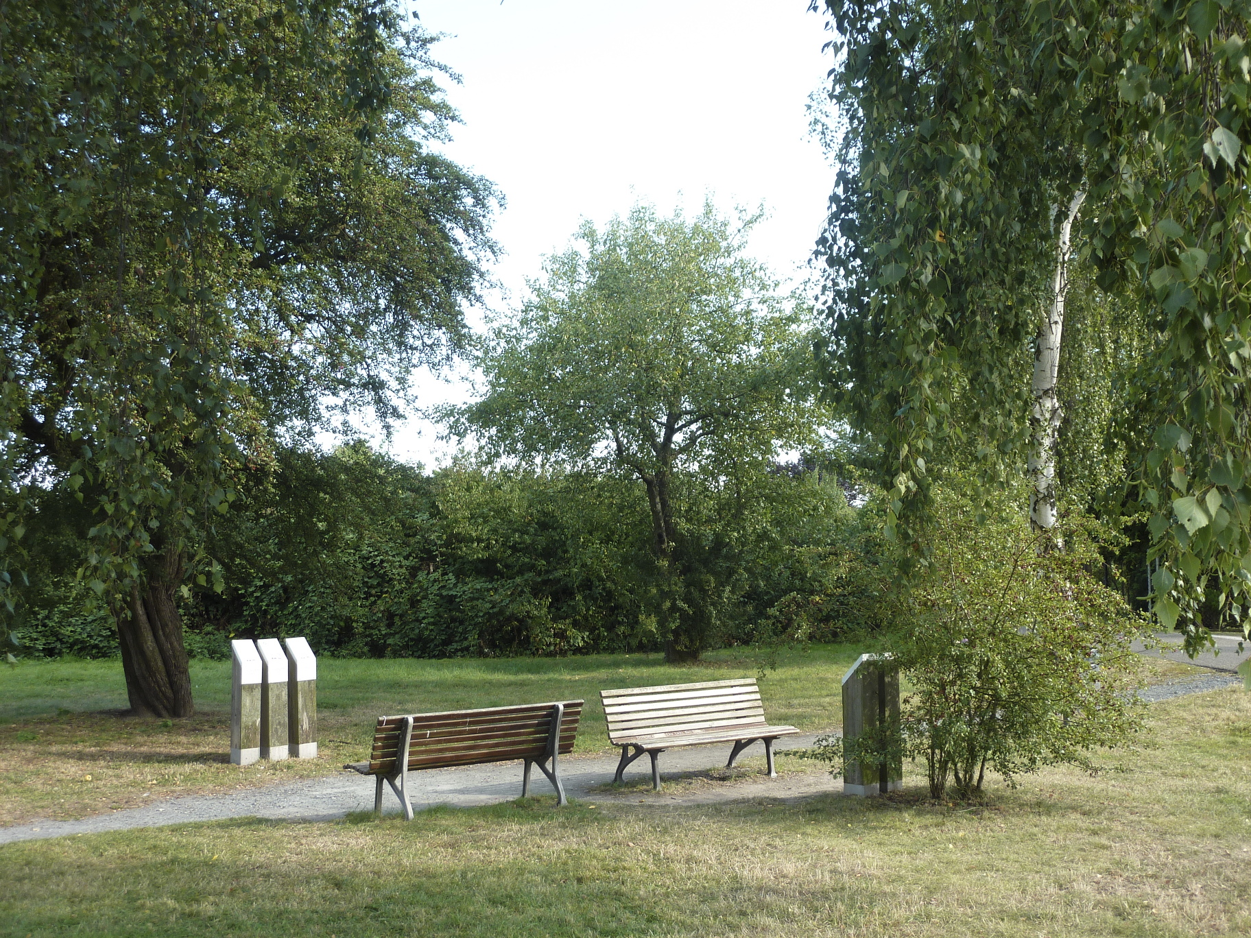 Frankfurt am Main: Im westlichen Stadtteil Sossenheim erinnert die im Jahr 2006 eingerichtete Chlodwig-Poth-Anlage an den in Sossenheim ansässigen Zeichner und Schriftsteller (1930–2004). Die Anlage liegt südlich des Ortsrandes im Sossenheimer Unterfeld im Frankfurter Grüngürtel. Vor Ort sind zwei von Poth gezeichnete Bildfolgen ausgestellt. Das Foto zeigt eine Totale der Anlage, Ansicht von Norden